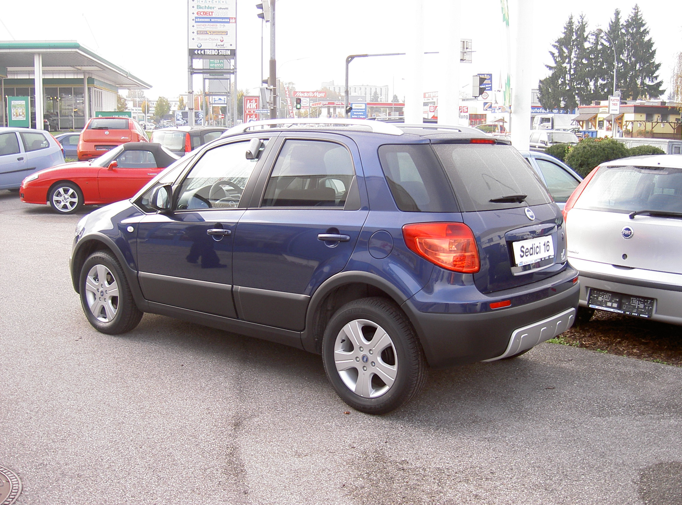 Fiat Sedici bei einem Fiat Händler